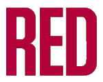 Logotipo de "Red".